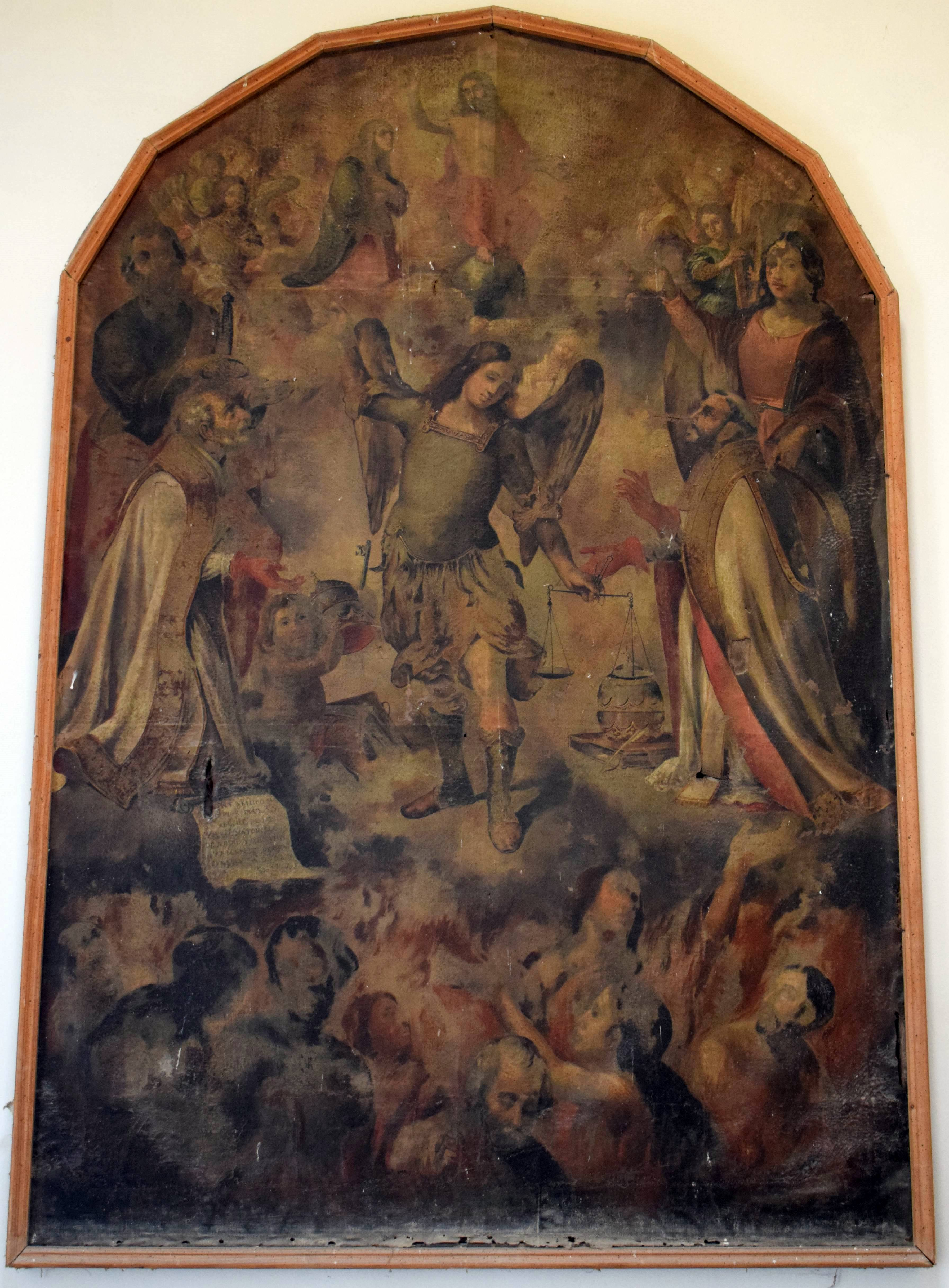 Antonio Hidalgo, pintor, Ánimas del Purgatorio, Conil, 1688